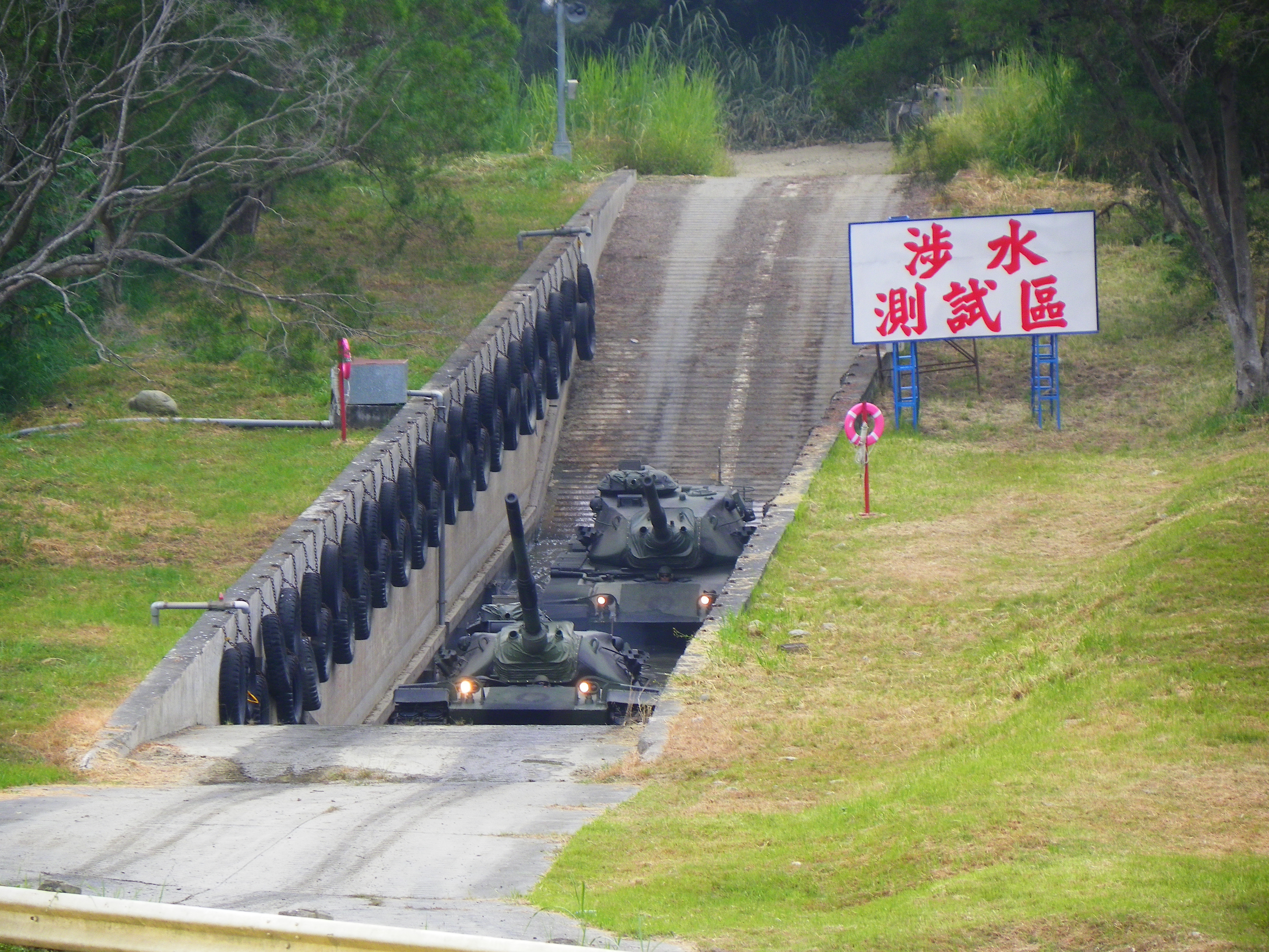 CM-21A裝甲運兵車完成涉水測試後，接著由M60A3 TTS戰車入水。